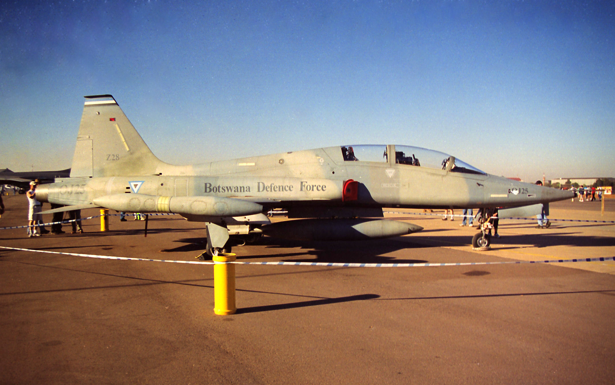 Botswana DF CF-5D OJ 25